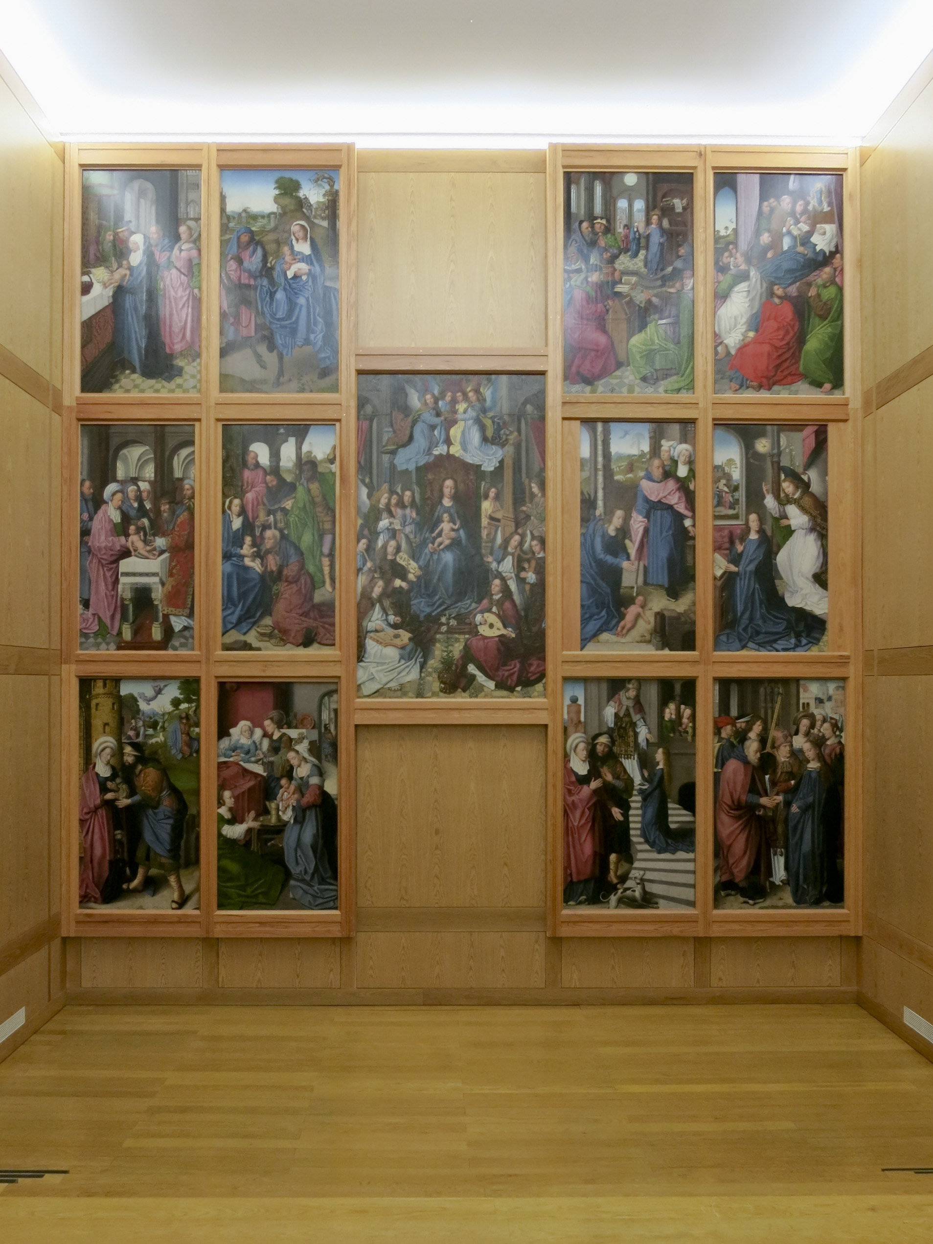 Retábulo da Sé de Évora, Museu de Évora